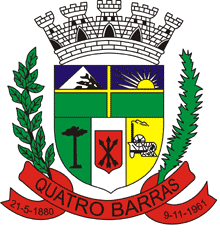 Brasão do município de Quatro Barras (Grande Curitiba), PR, Sul do Brasil.